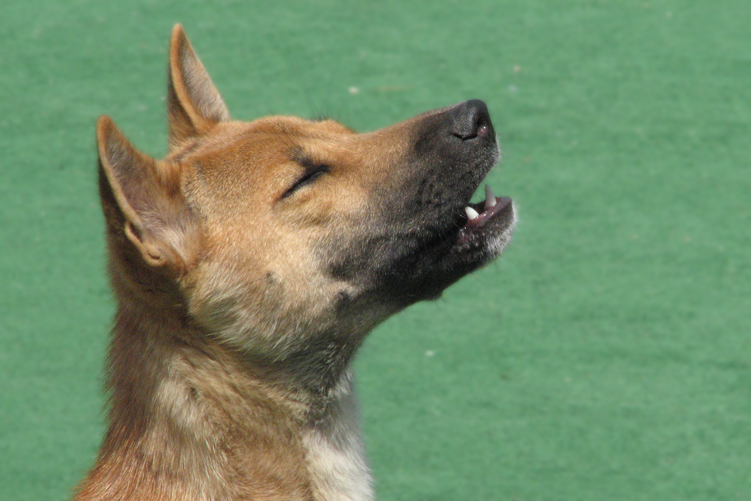 A New Guinea Singing Dog, singing.